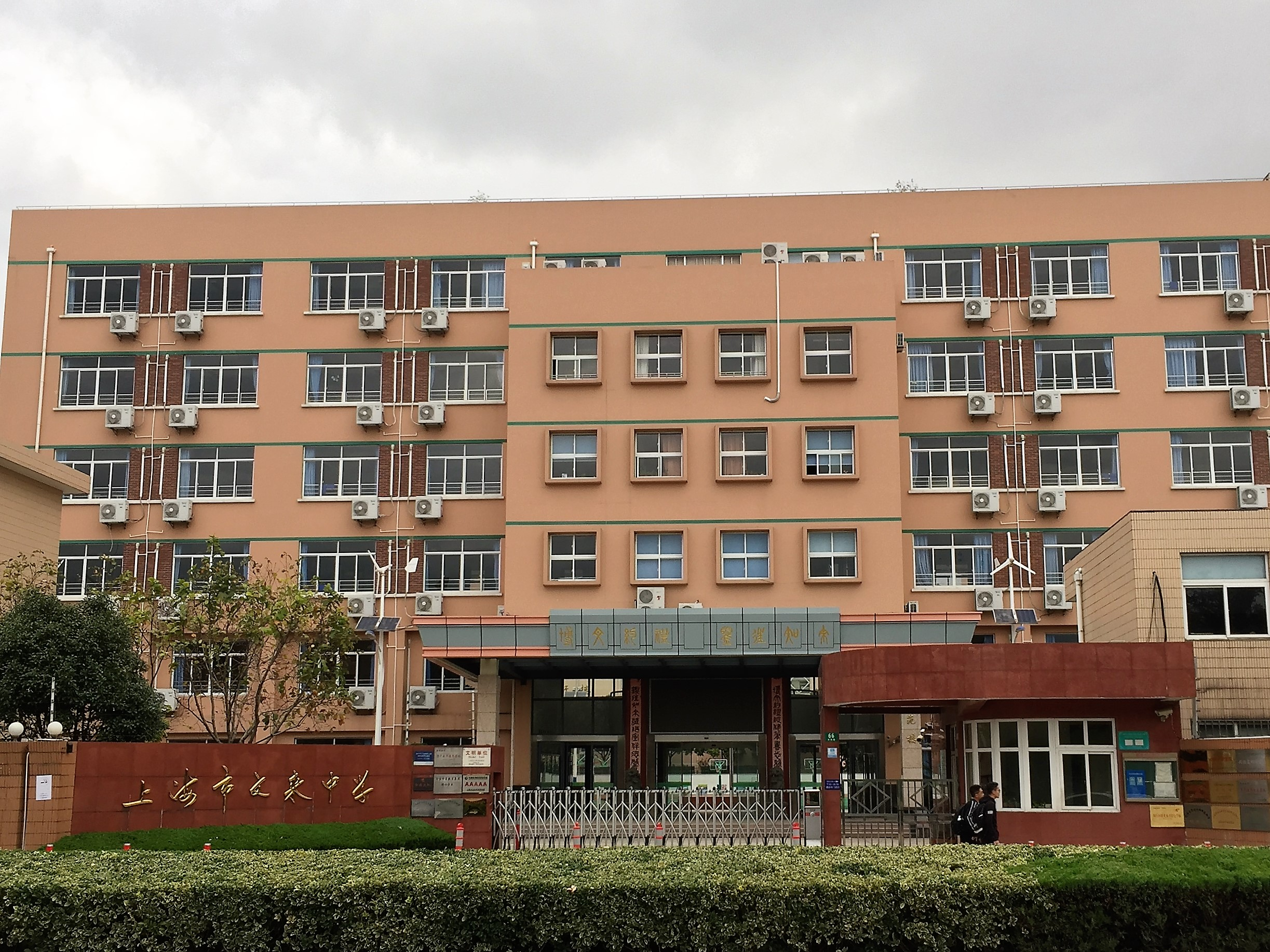 Shanghai Wenlai Middle School